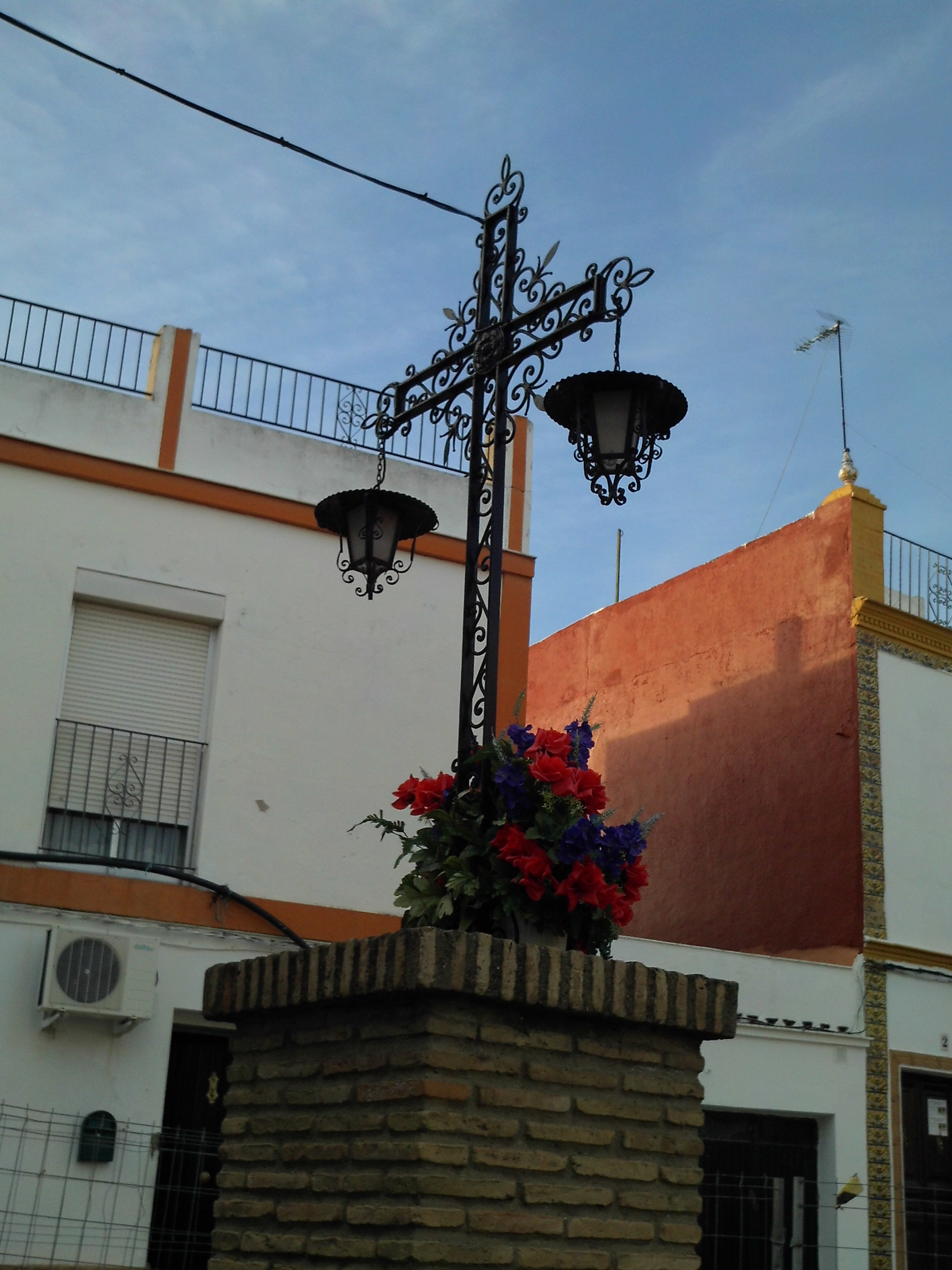 Cruz de la plaza de la Cruz en la localidad sevillana de Bormujos